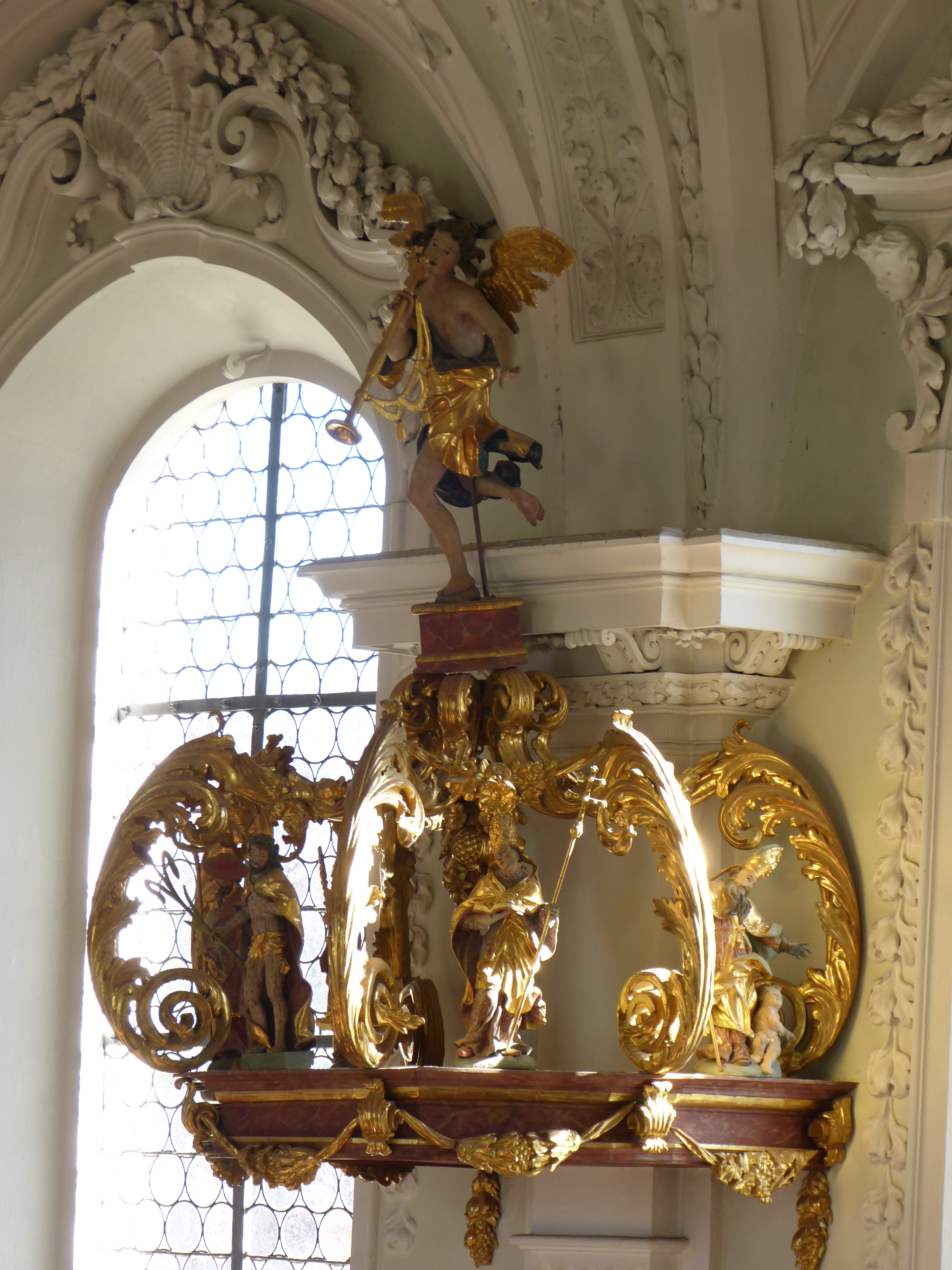 Mariä Himmelfahrt (Frauenzell)